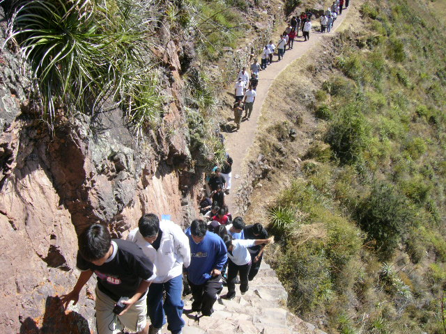 Pisaq